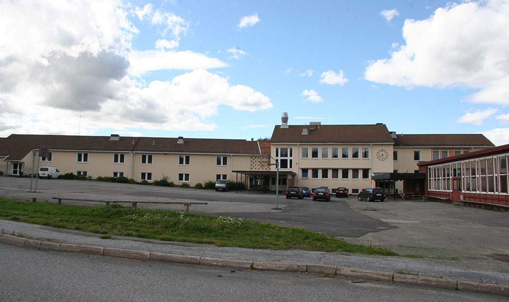 Vilberg ungdomsskole 2007